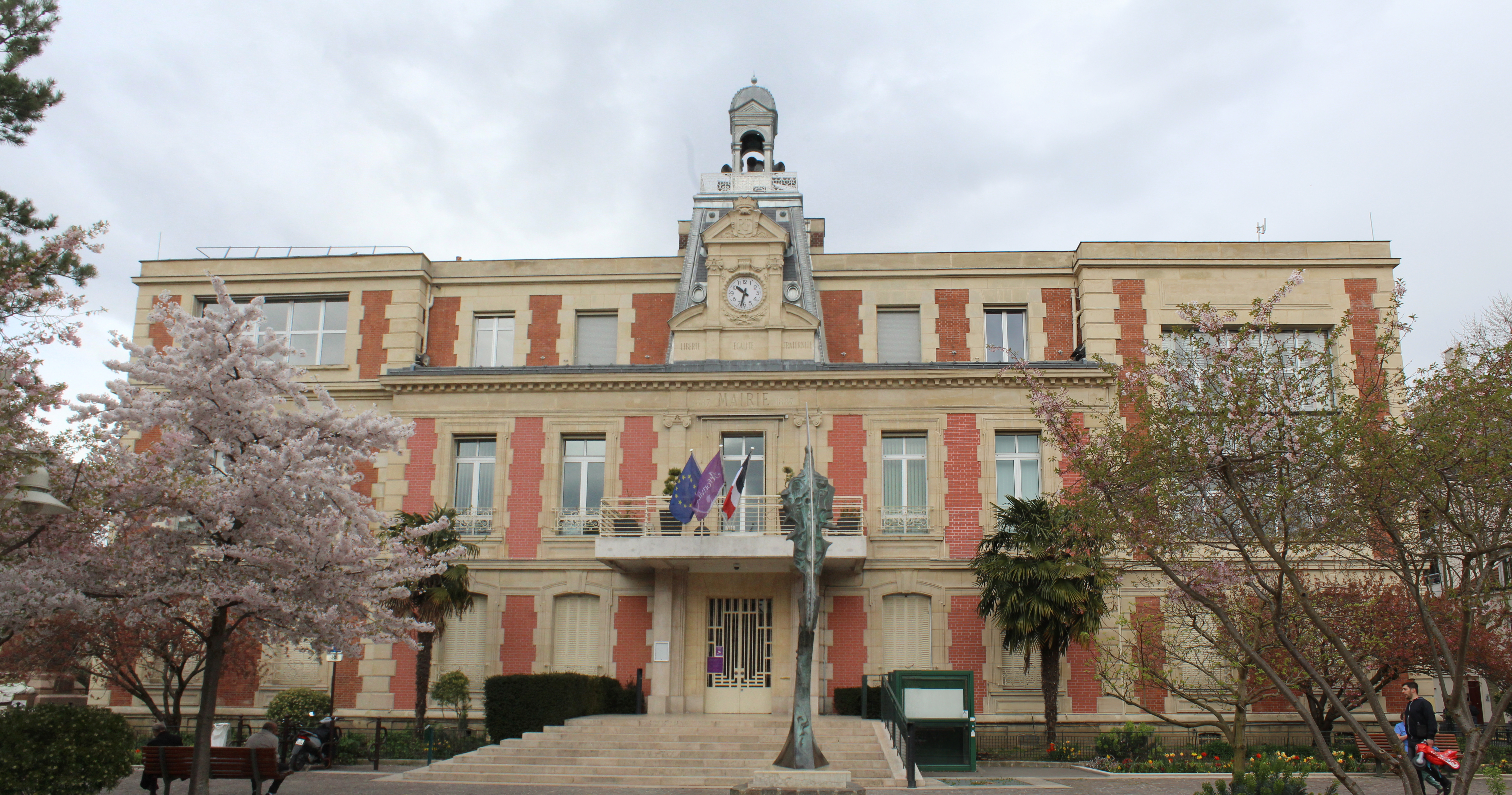 Mairie d'Alfortville.